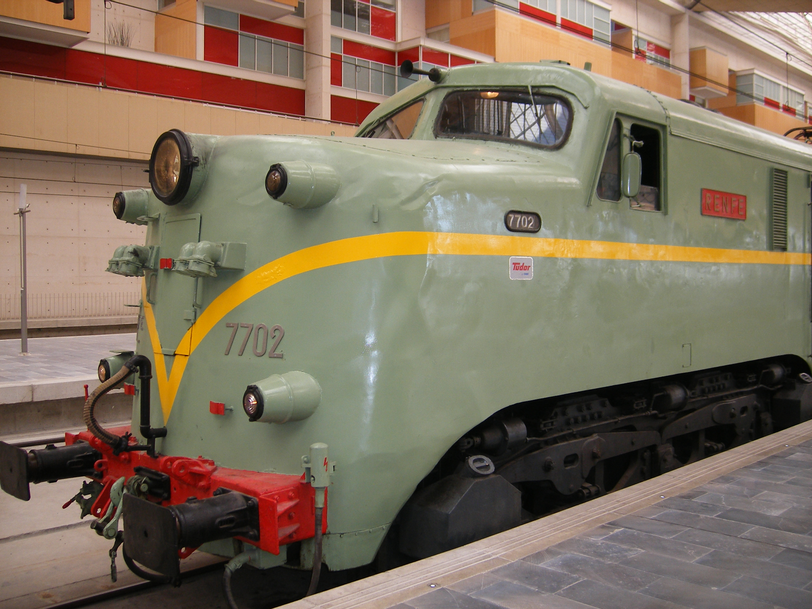 Lomotora eléctrica RENFE 7702 (277-002) de la AZAFT (Asociación Zaragozana de Amigos del Ferrocarril y Tranvías) en la estación de Zaragoza-Delicias. Esta locomotora se encargó de traccionar el tren histórico "Tren del Solsticio de Capricornio" organizado por la AZAFT el día 21 de diciembre de 2008.